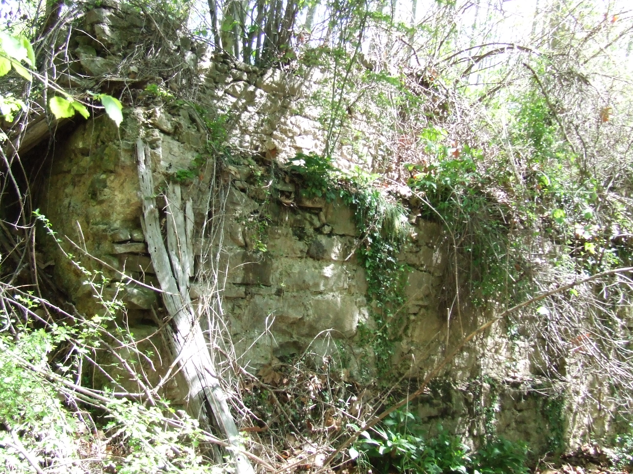 El Molí dels Sorts (Marfà, Castellcir, Moianès)